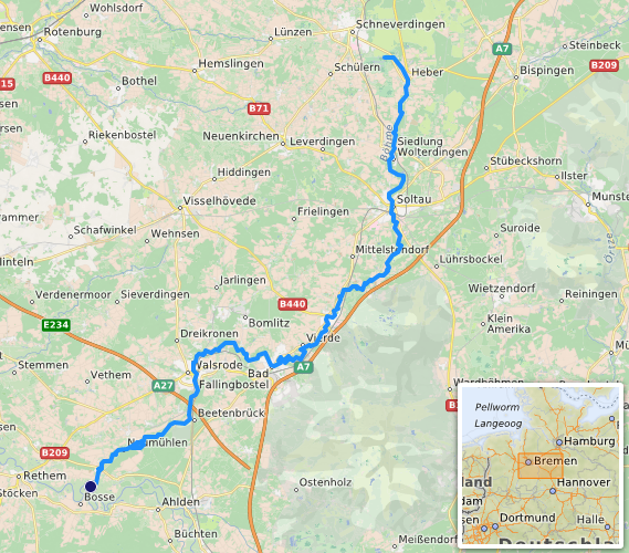 carte réalisée sur umap [ This map may be incomplete, and may contain errors. Don't rely solely on it for navigation.